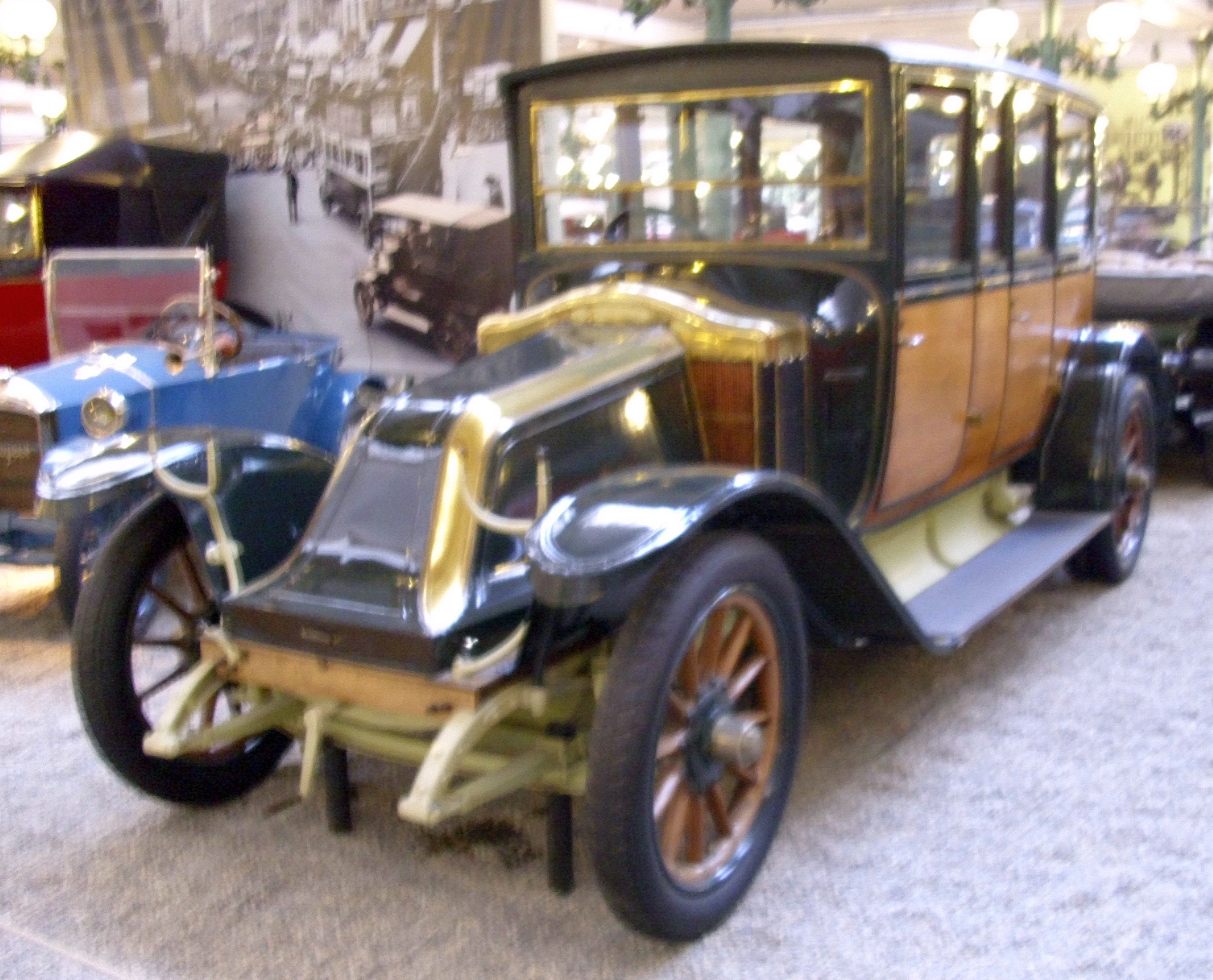 Renault Type EU Limousine 1920